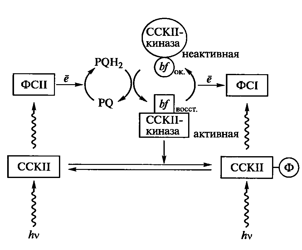 Взаимодействие фотосистем